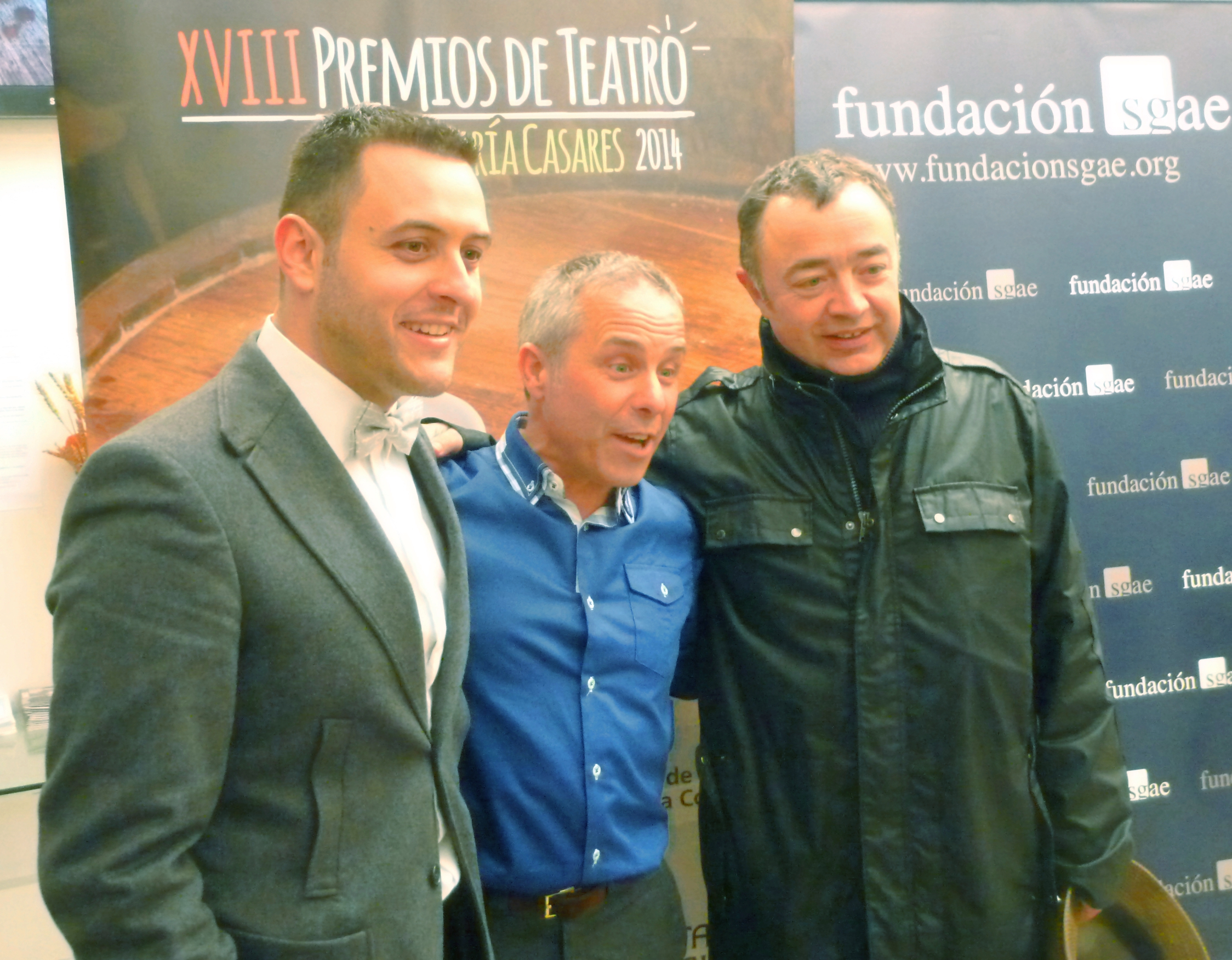 Roberto Pascual, Avelino González e Santi Prego na gala dos premios María Casares 2014.